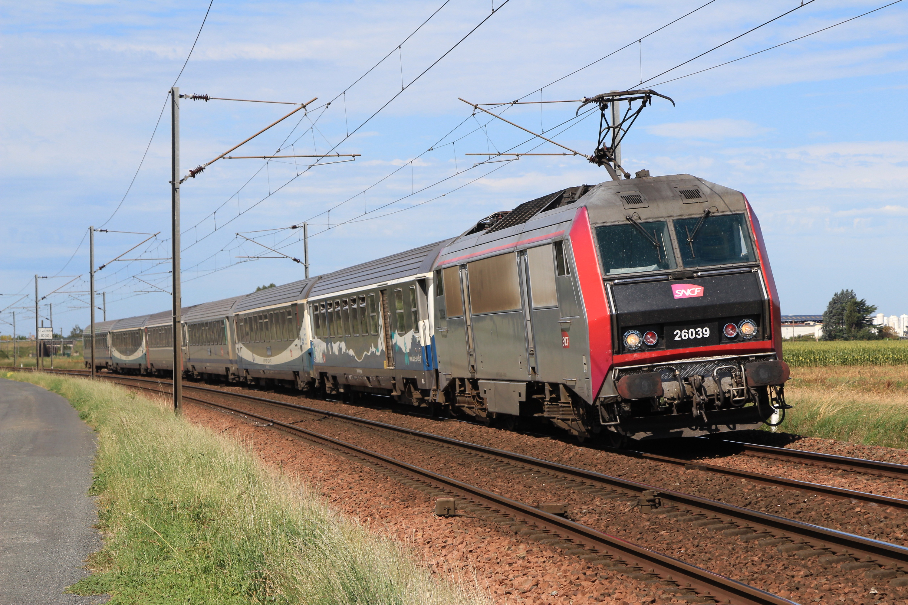 La BB 260039 en livrée « Carmillon » et 6 voitures Corails du parc Interloire, sur le TER Interloire n° 860006 (Nantes - Orléans), à Saint-Mathurin, entre Angers et Saumur.